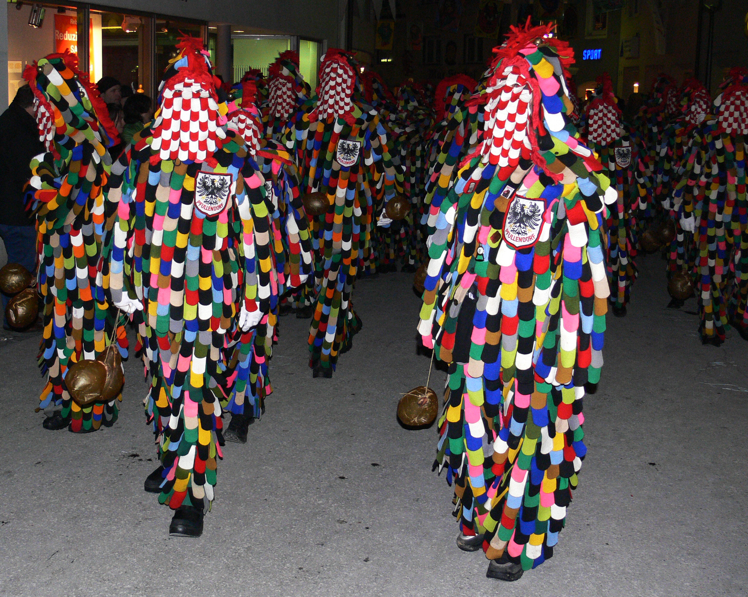 Stegstrecker Pfullendorf Veranstaltung: VSAN-Landschaftstreffen 2006 in Weingarten, Flecklesumzug